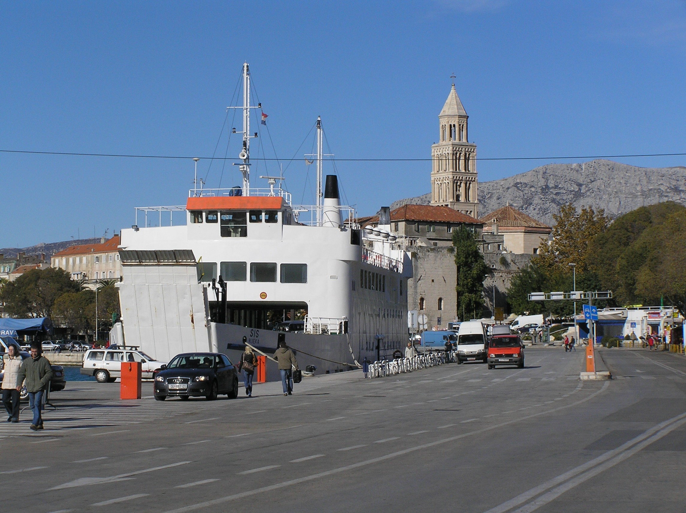 Split